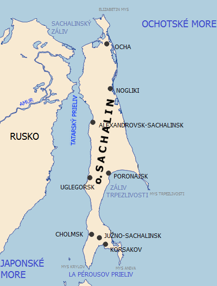 Mapa ostrovu Sachalin.